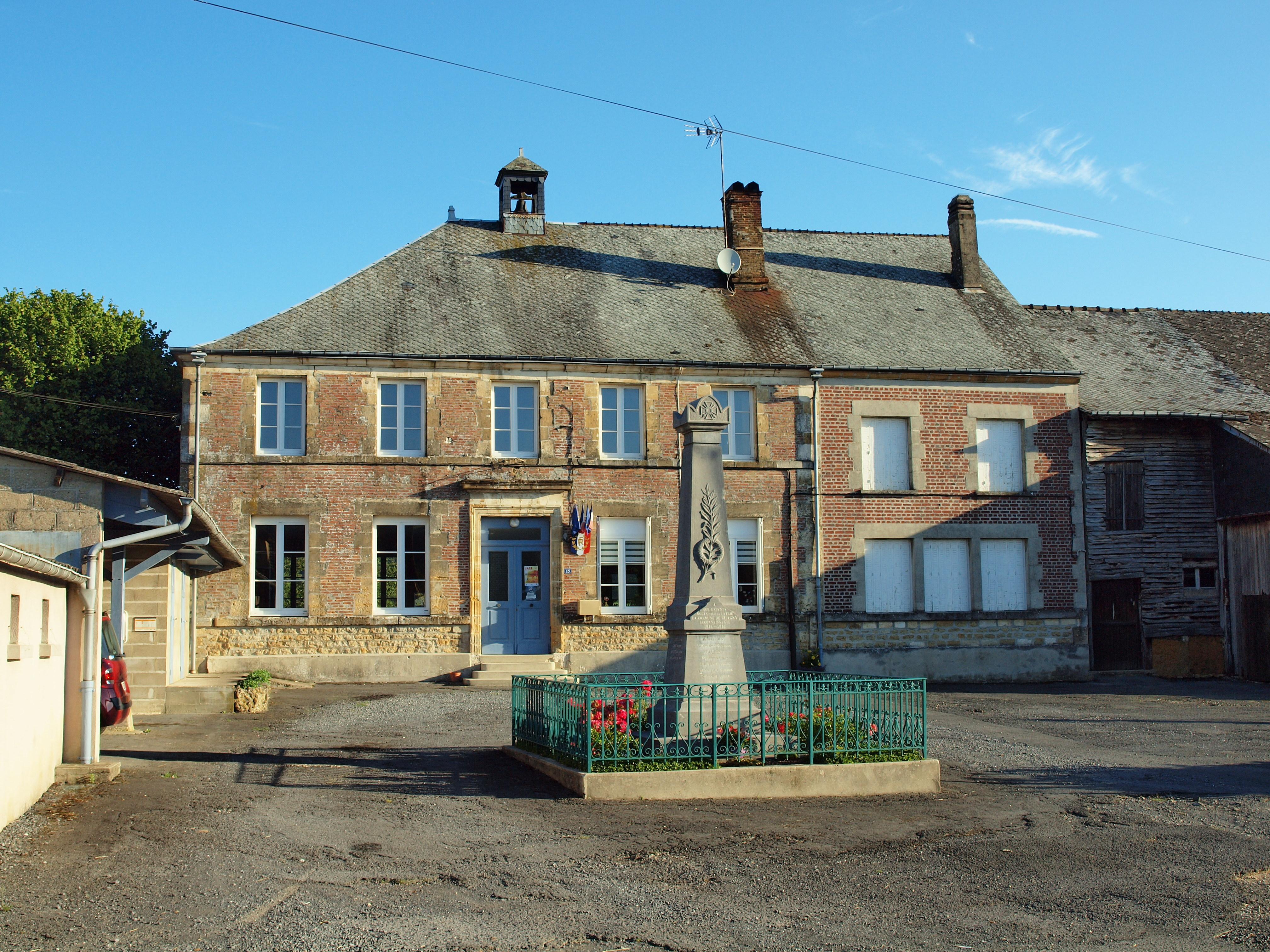 Chagny (Ardennes, France)